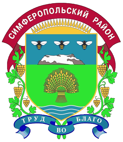 Герб Симферопольского района Республики Крым, утверждённый 4 августа 2015 года